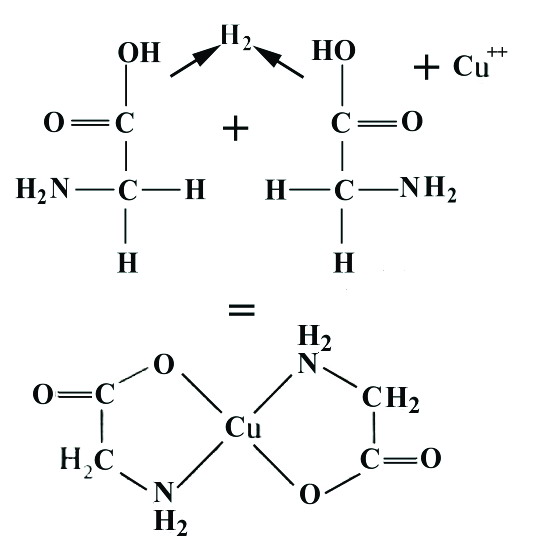 Chelazione di uno ione cuprico da parte di due molecole di glicina (un amminoacido) con la pardita di uno ione idrogeno